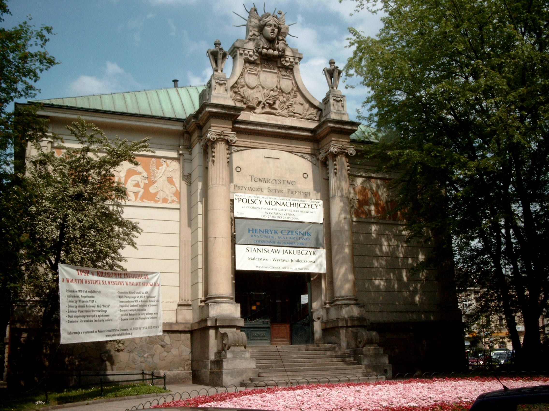 Gmach Towarzystwa Przyjaciół Sztuk Pięknych w Krakowie przy Placu Szczepańskim 4